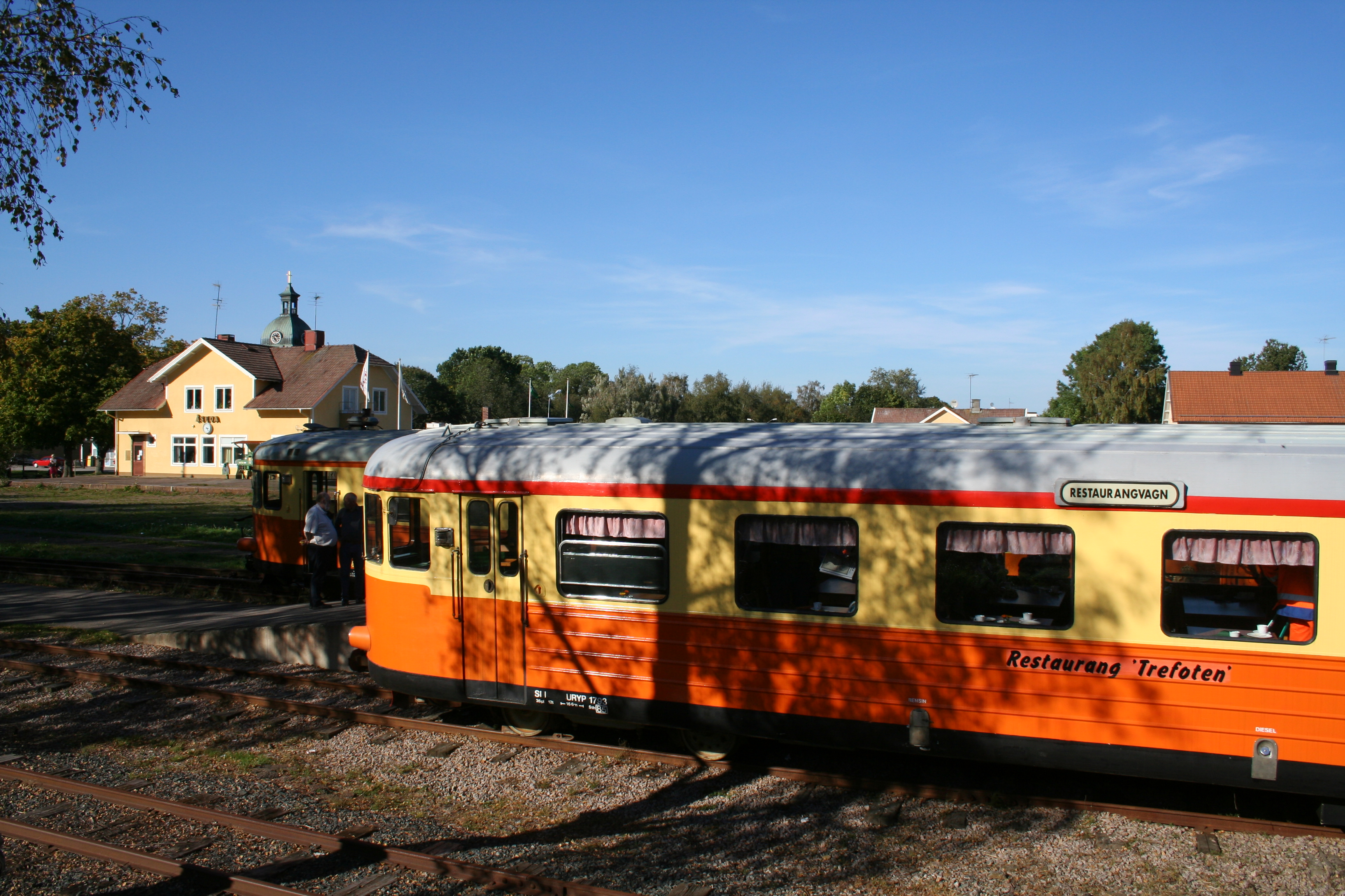 Sista motorvagnståget på normalspåret inväntar avgång från Åseda. Närmast i bild smalspåret till Hultsfred, Västervik.